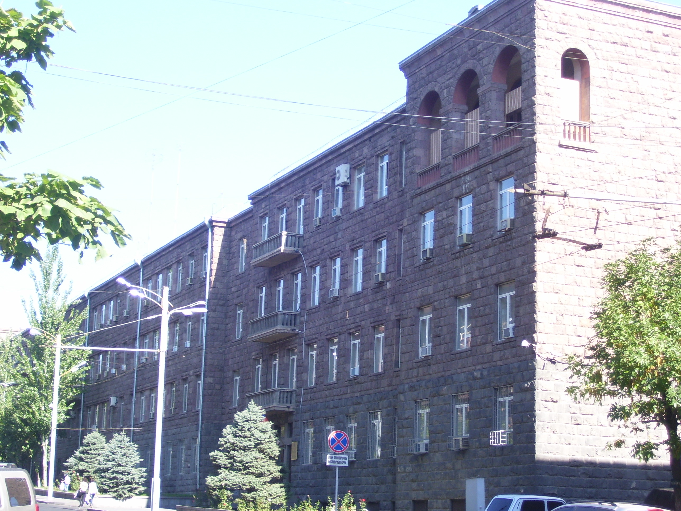 Վարչական շենք ՀՀ Ազգային անվտանգության նախարարության 1936 թ. Նալբանդյան փող. 104, Ճարտ.` Գ. Քոչար 6/165